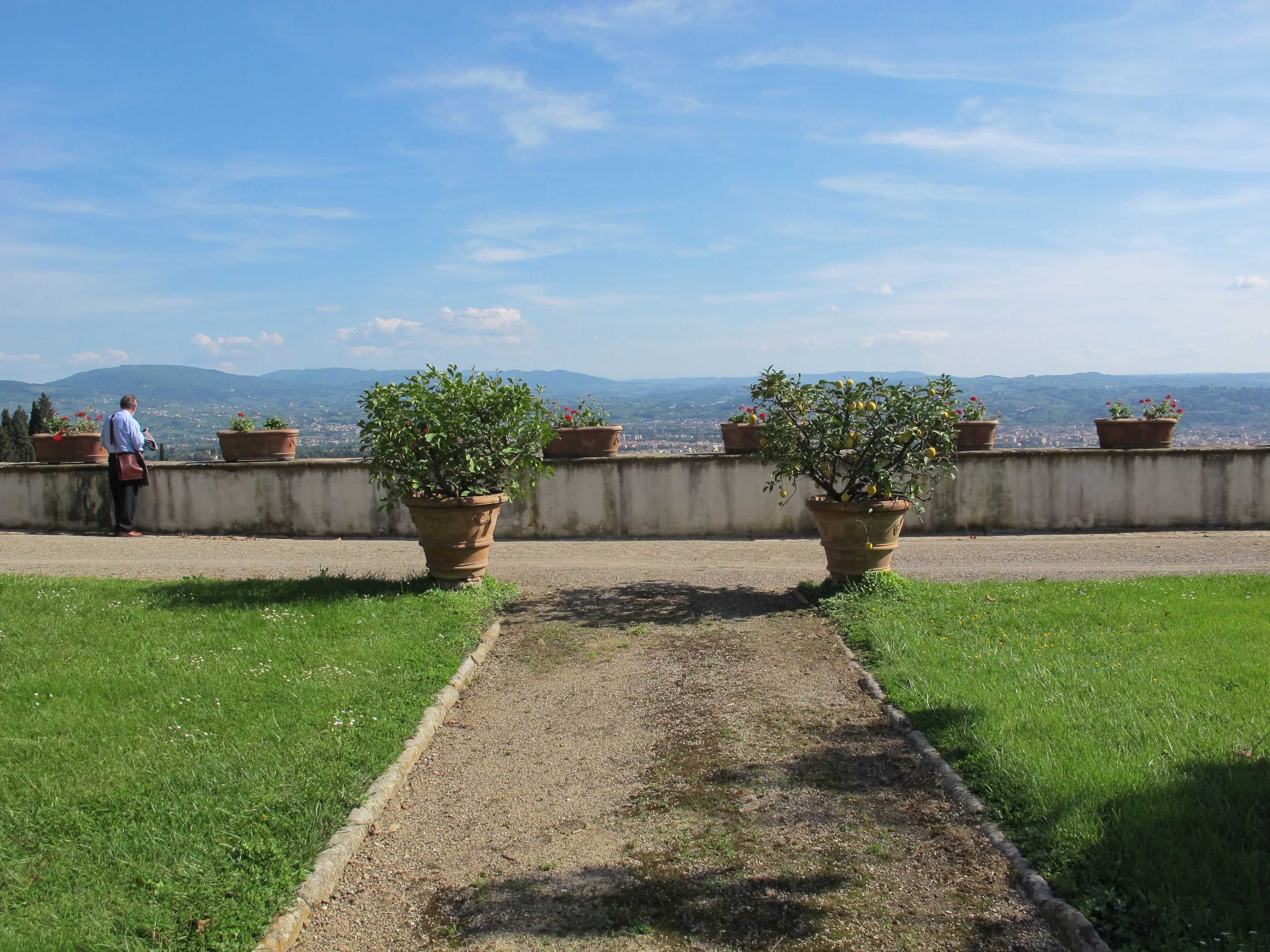 Villa medici di belcanto, prima terrazza